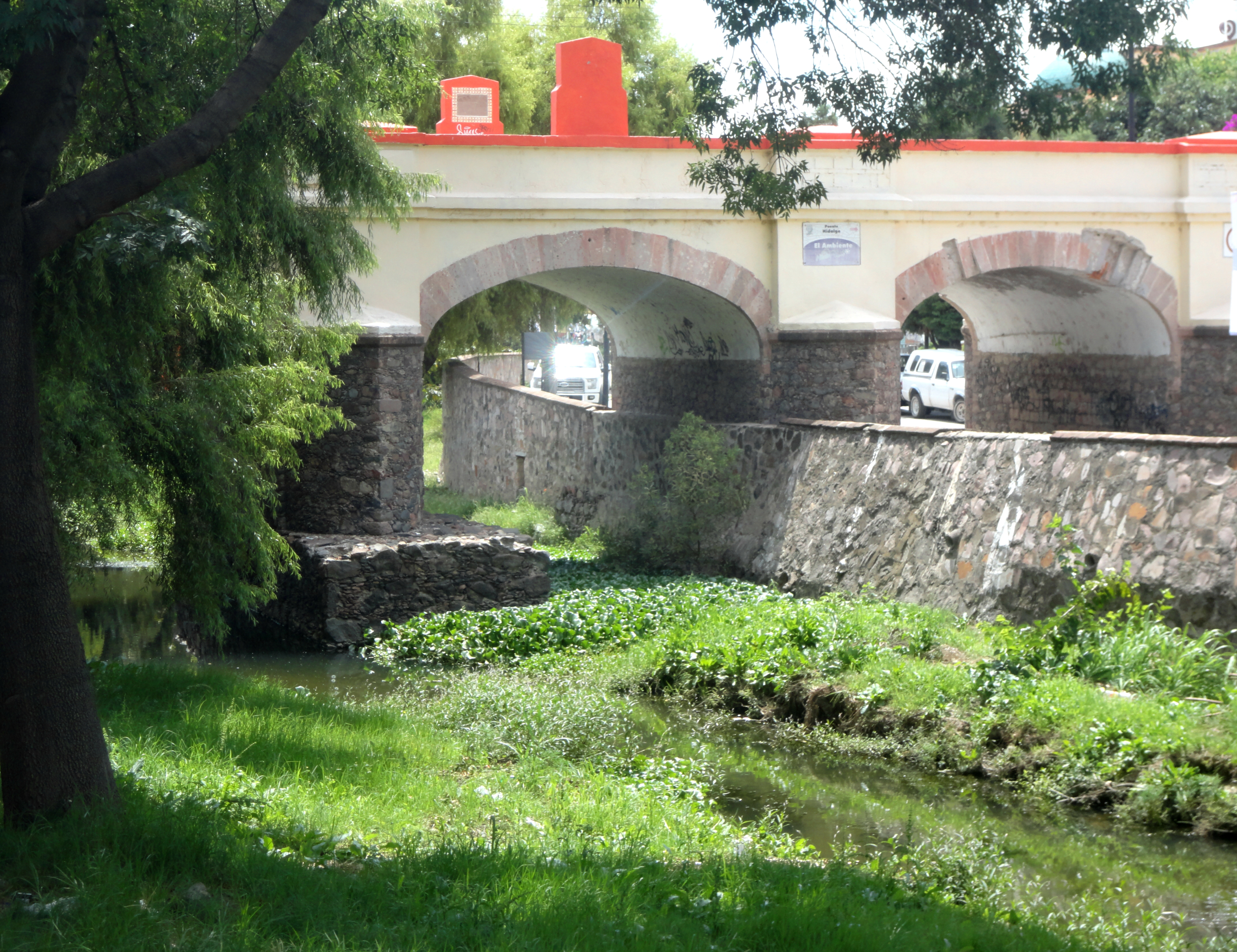 Río Batán en Dolores Hidalgo, Guanajuato, México.